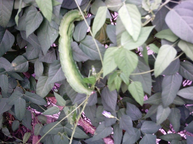 Pokok, buah dan bunga kacang botor atau kacang kelisa. Menggunakan kamera GrandVision EZshot E32 dengan resolusi 800x600 piksel pada 20 May 2005 di Ayer Keroh, Melaka